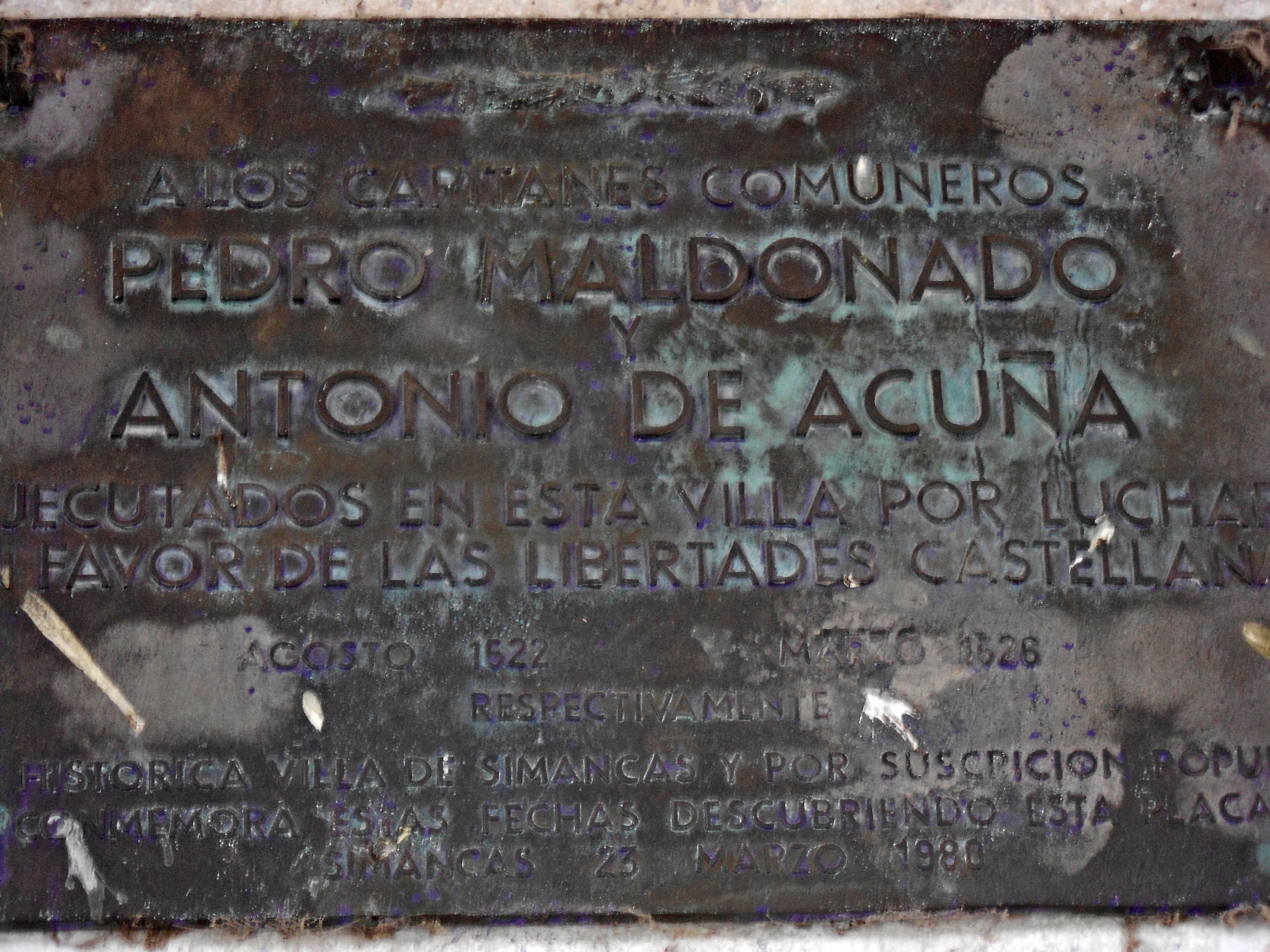 Justicia imperial